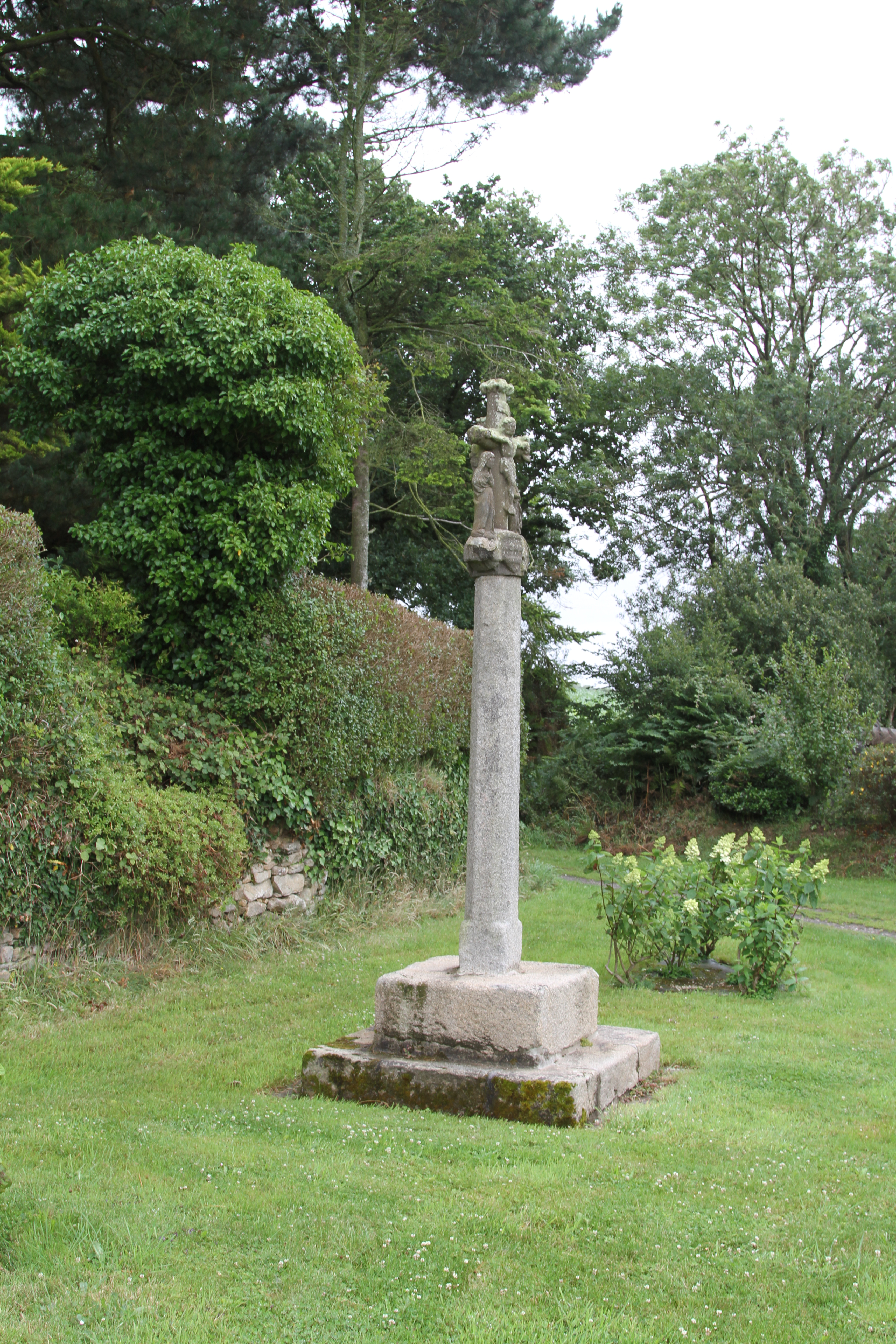 Coat-Meal : la croix de Castel-Huel